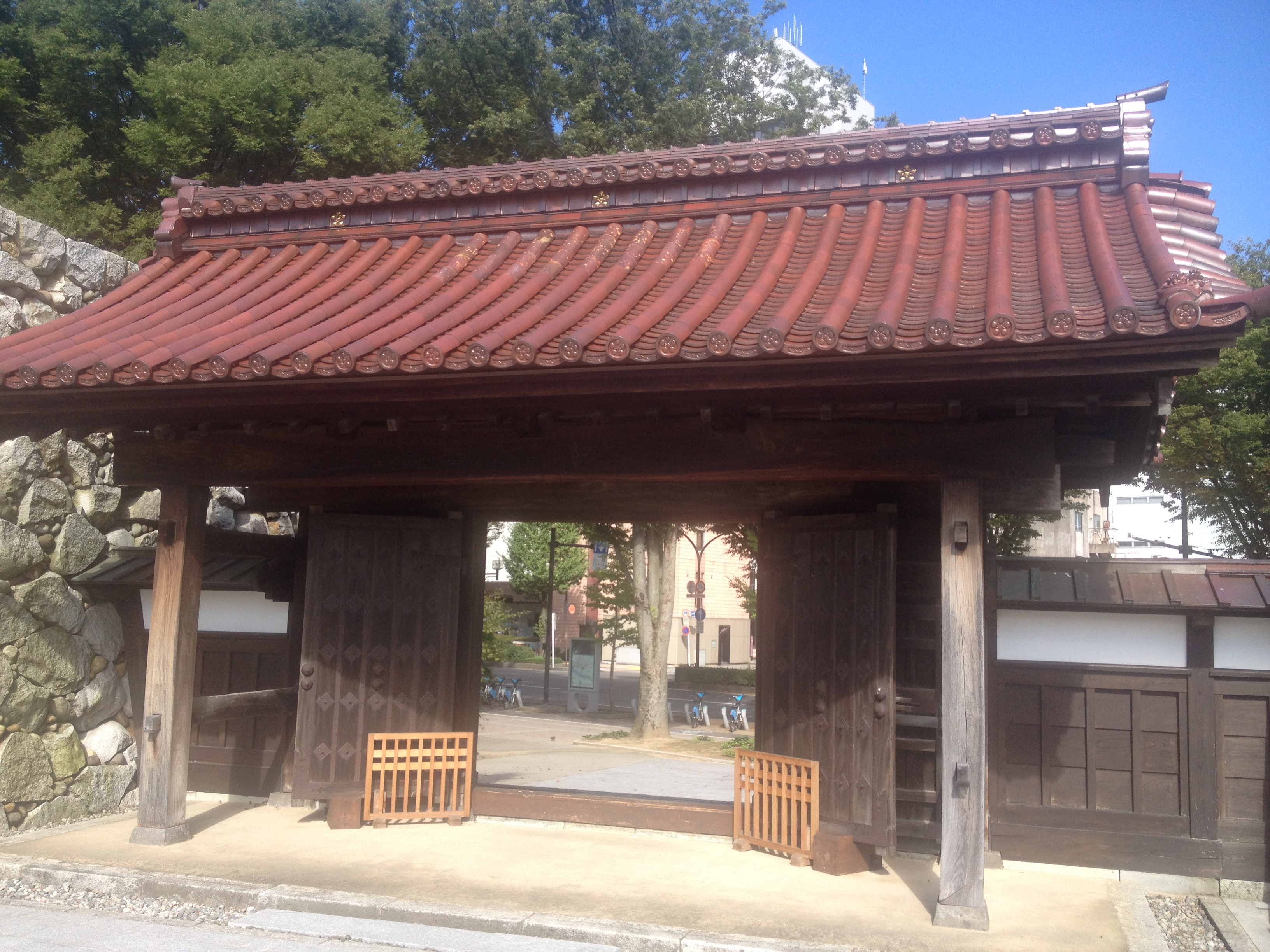 富山市、富山城址公園内の千歳御門